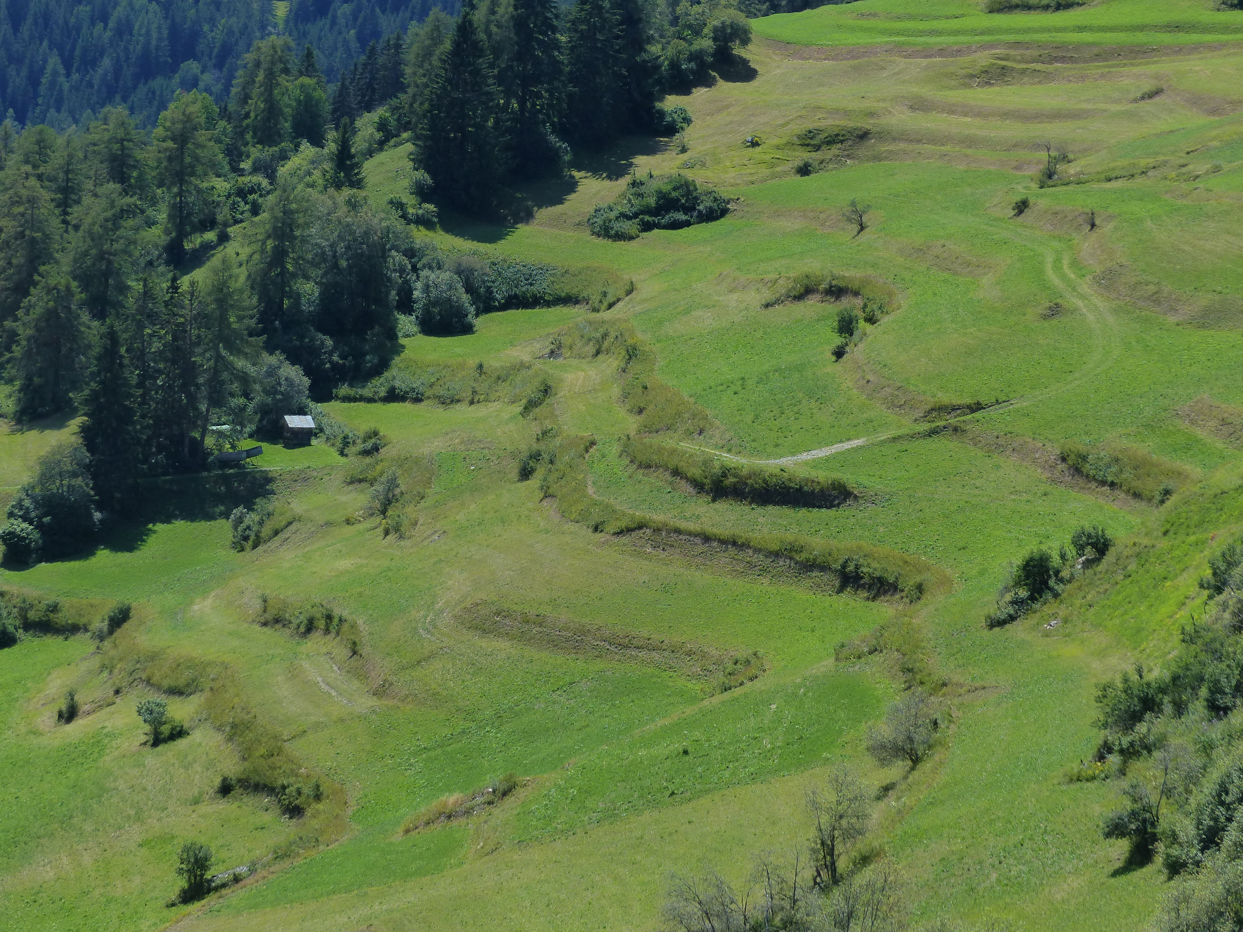 Ehemalige Ackerbau-Terrassen westlich von Tschlin